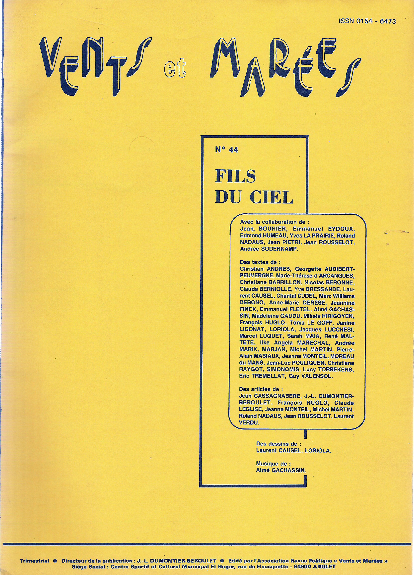 Couverture d'un numéro de la revue "Vents et Marées"